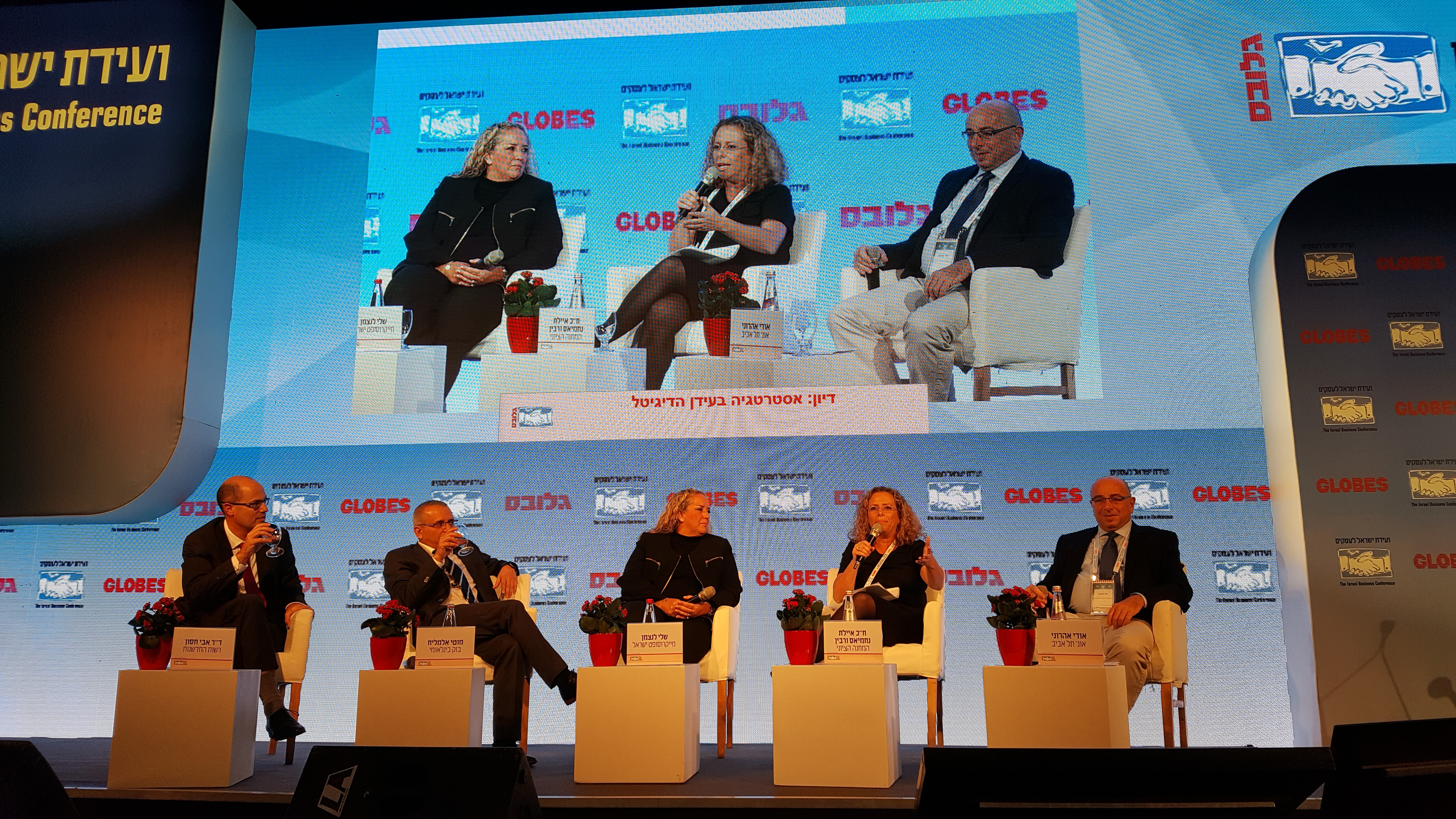 ועידת ישראל לעסקים 2016, פאנל